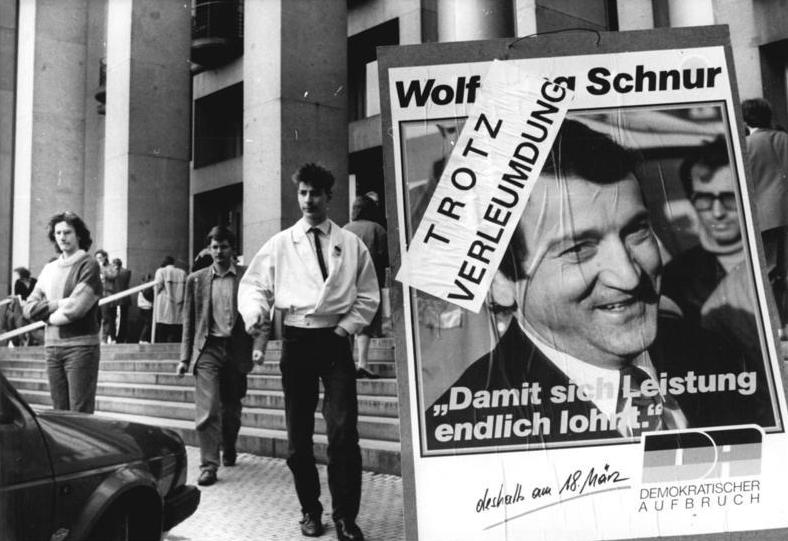 ADN-ZB-Häßler-11.3.90-Dresden: Wahlkampf. Die Delegierten des Wahlparteitages des Demokratischen Aufbruch haben sich angesichts der Vorwürfe gegen Wolfgang Schnur geschlossen hinter den Vorsitzenden gestellt. Plakat vor dem Tagungsgebäude, dem Hygienemuseum Dresden.